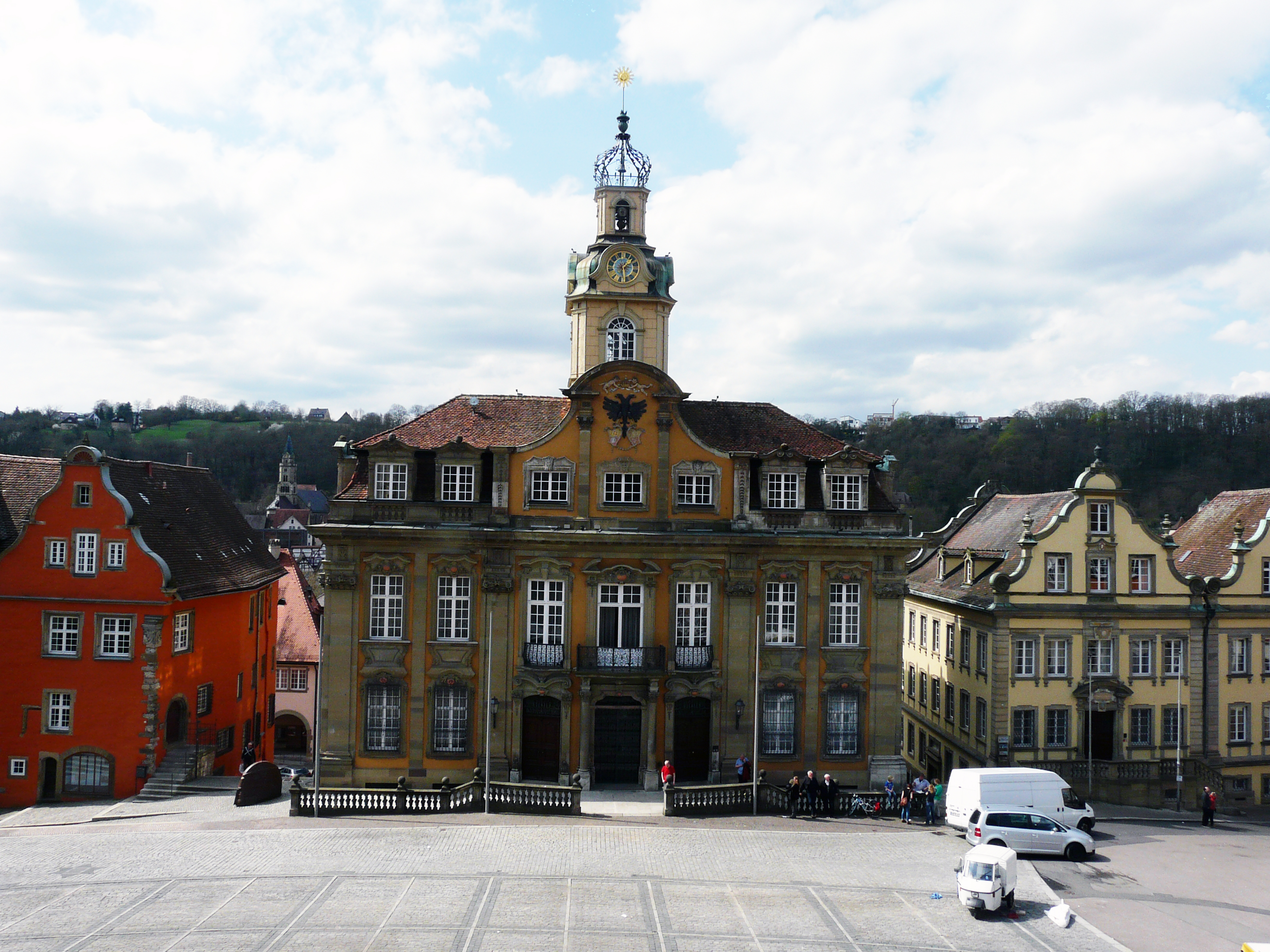 Городская ратуша